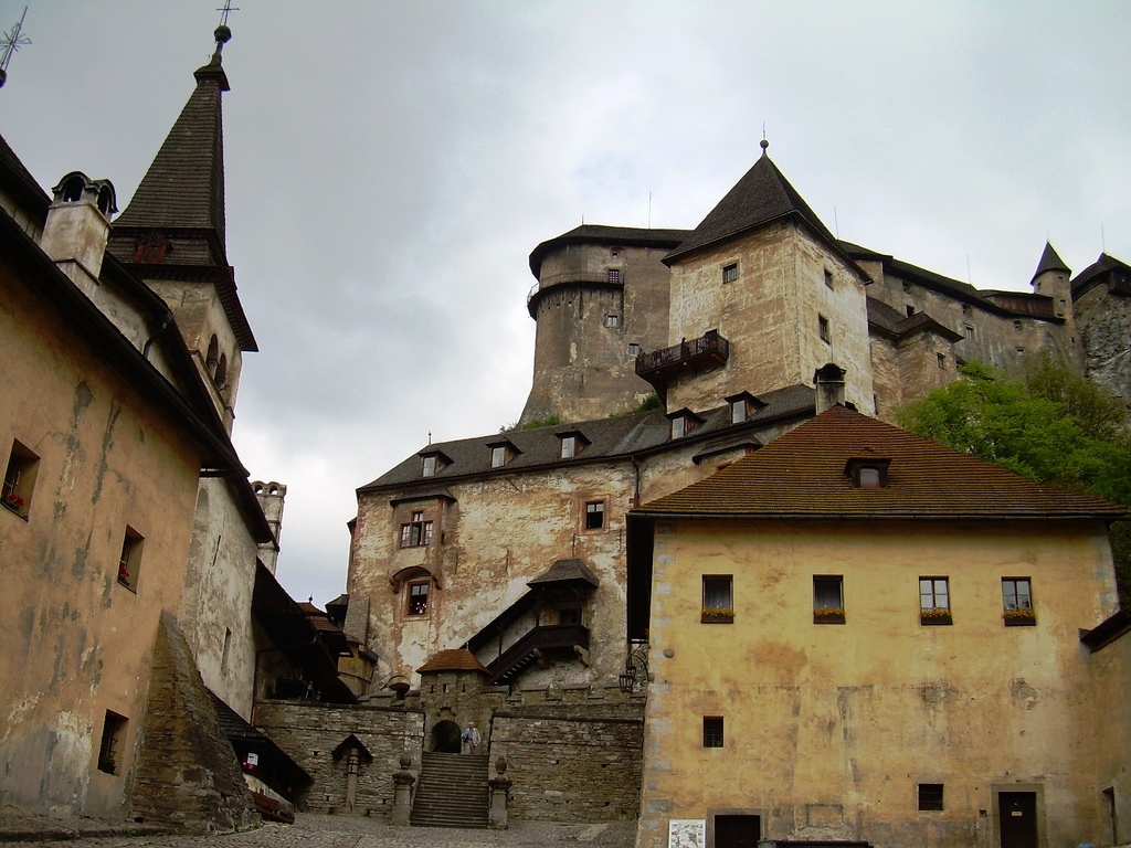 Árva vára (Szlovákia)